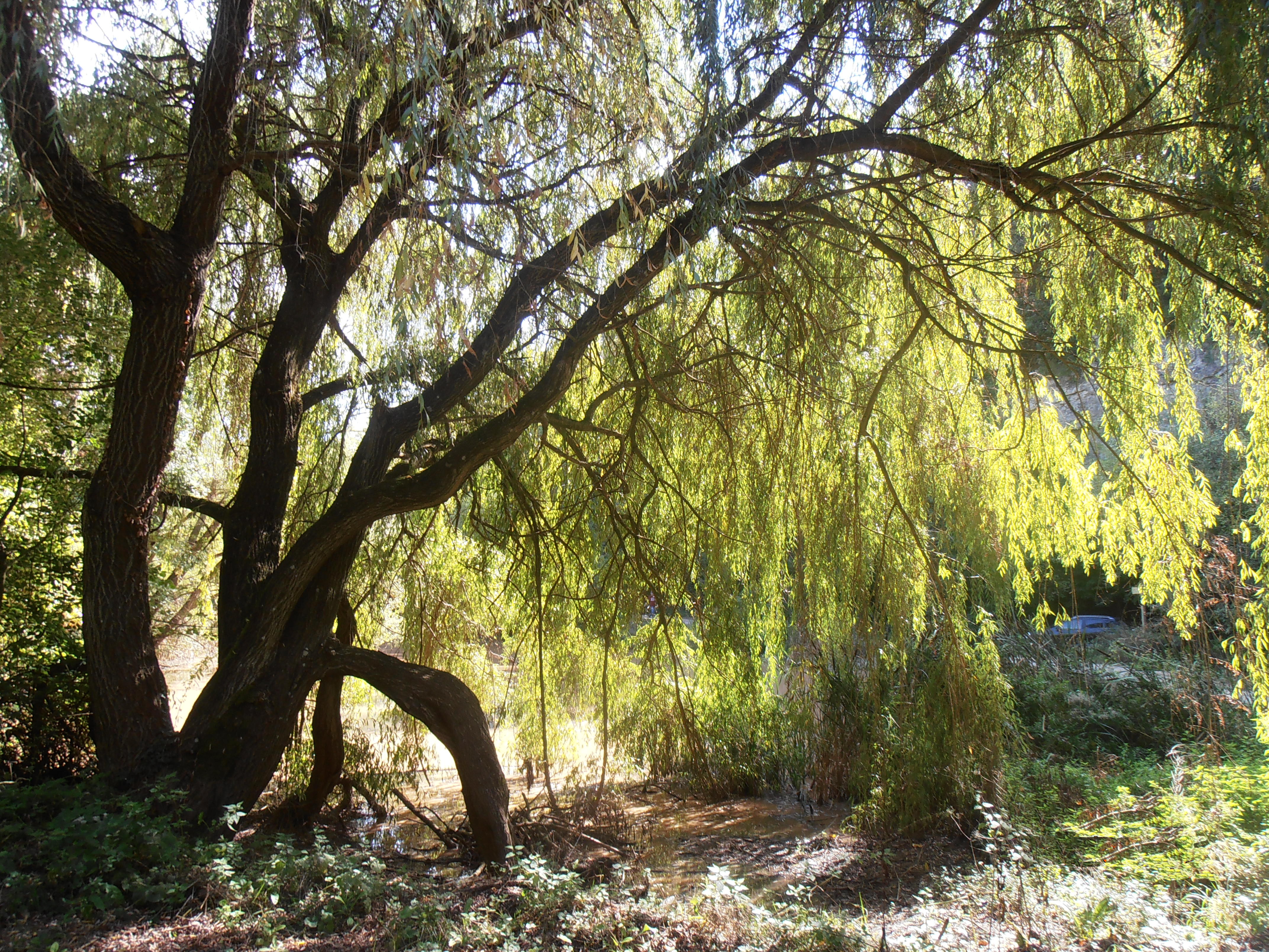 Bucòlic racó de la petita presa sobre la riera del Sorreigs. Més aviat un aqüífer per la cria d'aus.